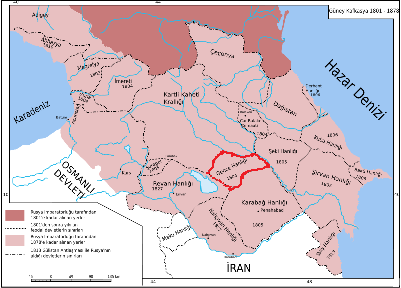 Gence Hanlığı 1804 Sınırları